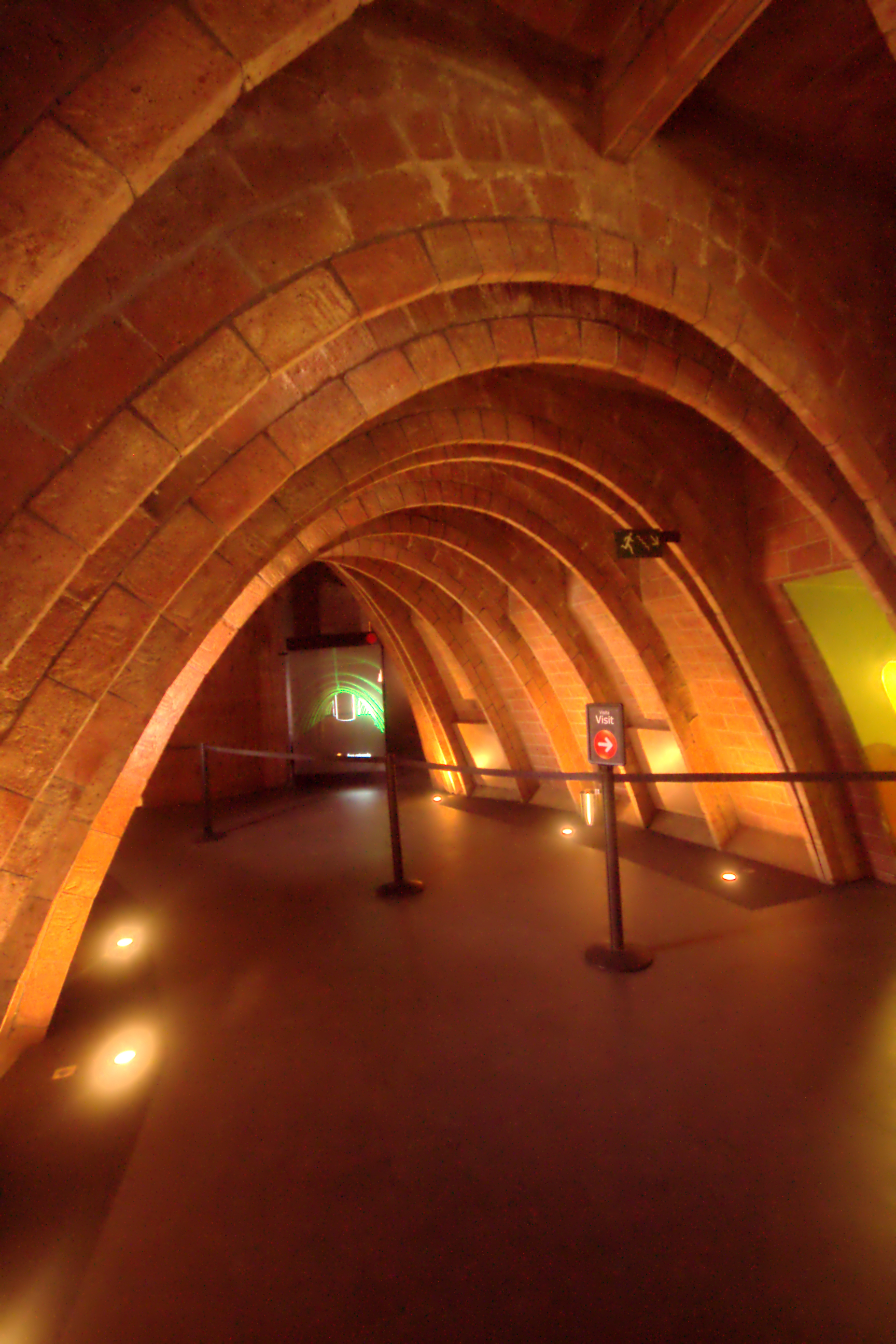 Sótão na Casa Milà